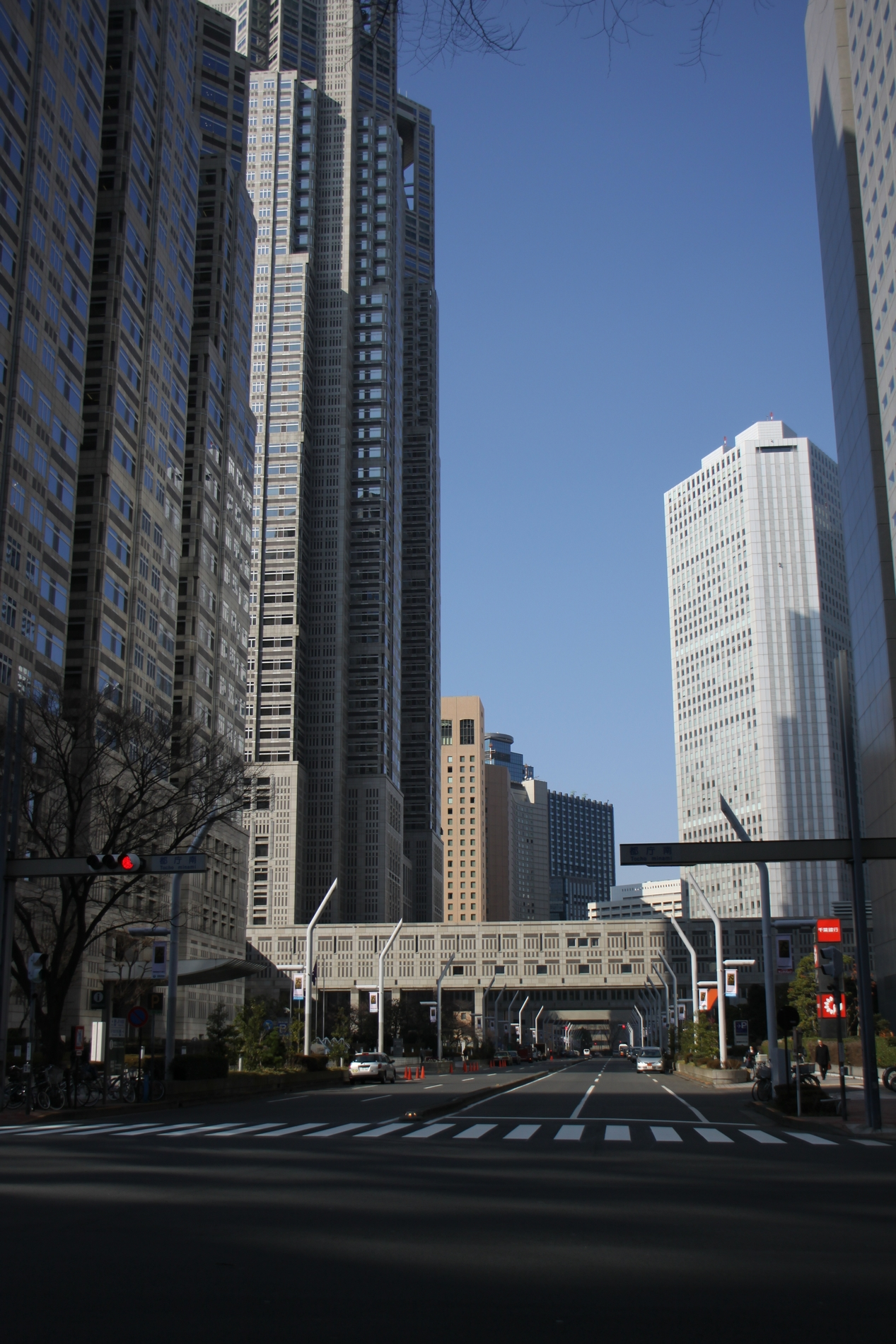 東京都道新宿副都心十一号線。都庁南交差点で撮影。